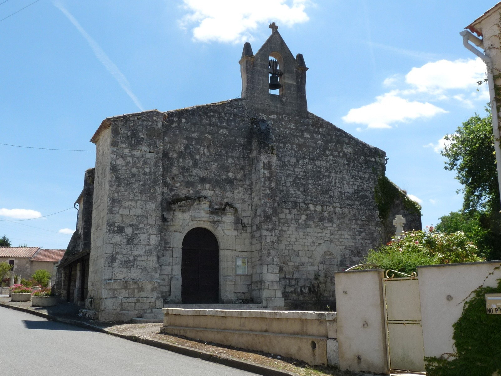 Eglise de Riocaud, Gironde, France